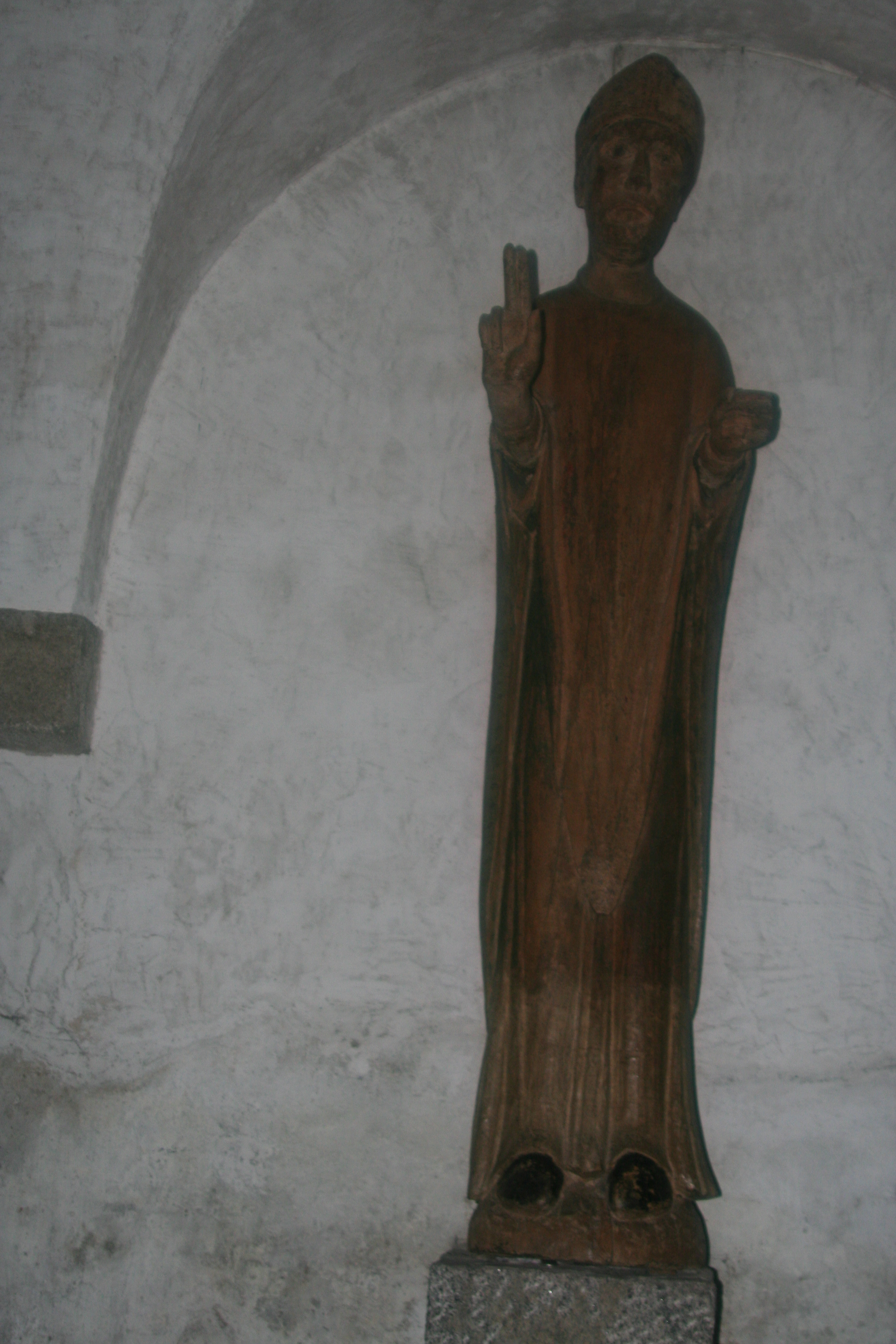 Stift Innichen:Stautue des Stiftpatrons St. Candidus, ca.1240